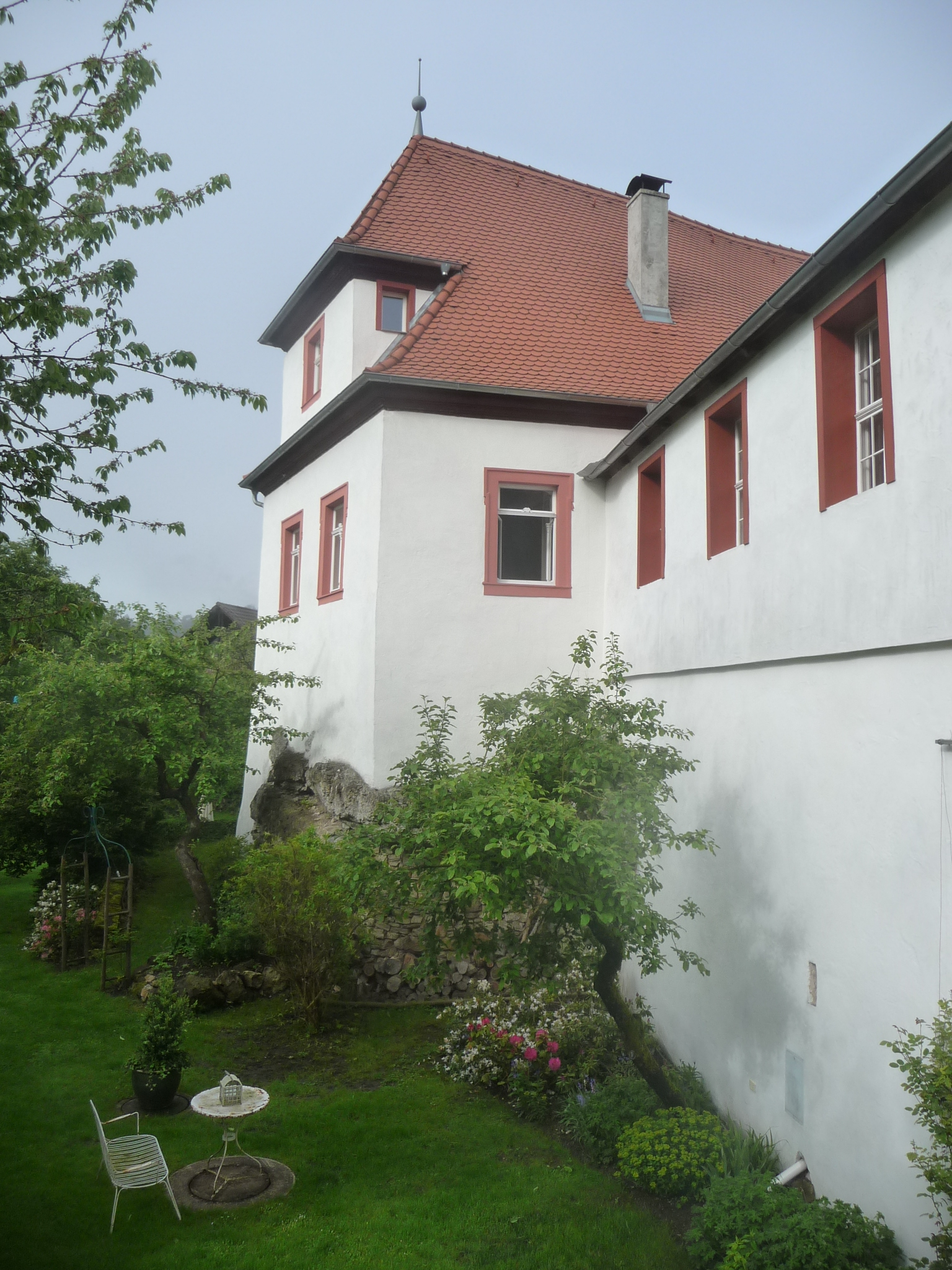 Burg Plankenfels in Plankenfels, Landkreis Bayreuth